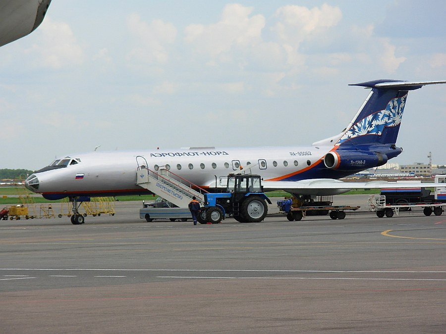 Samolot Tu-134A rosyjskich linii lotniczych Aeroflot-Nord na lotnisku Szeremietiewo-1 w Moskwie. 22 lipca 2006 r.